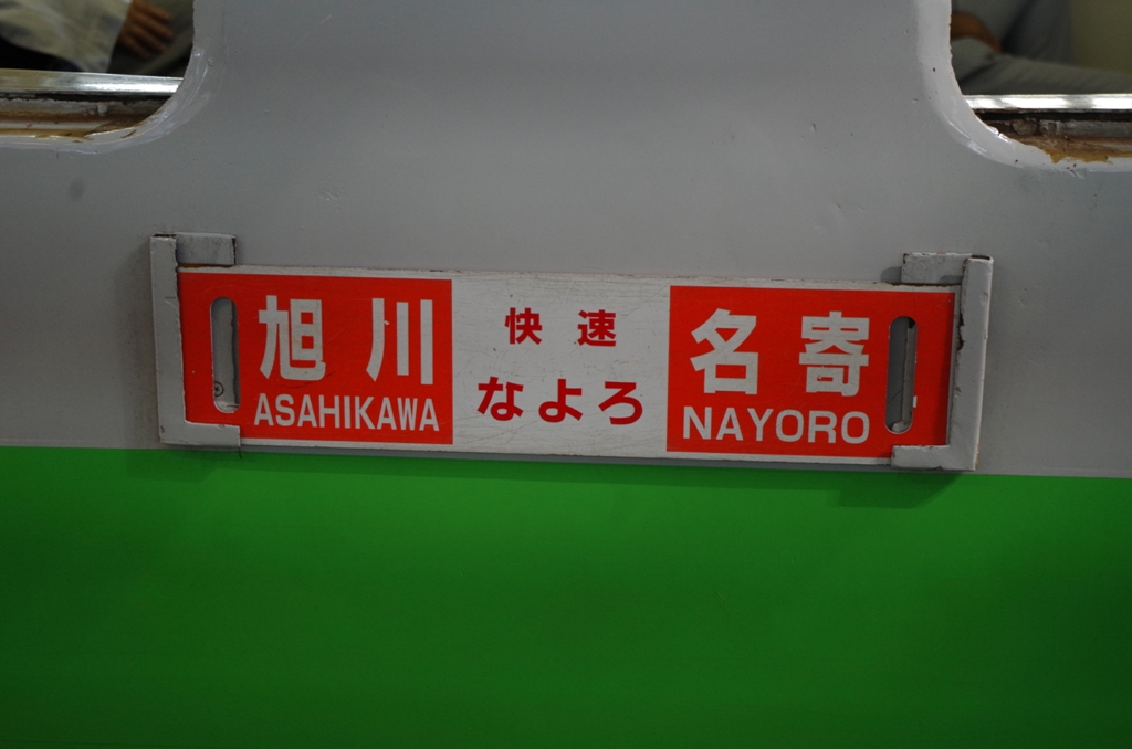 快速なよろ号のサボ